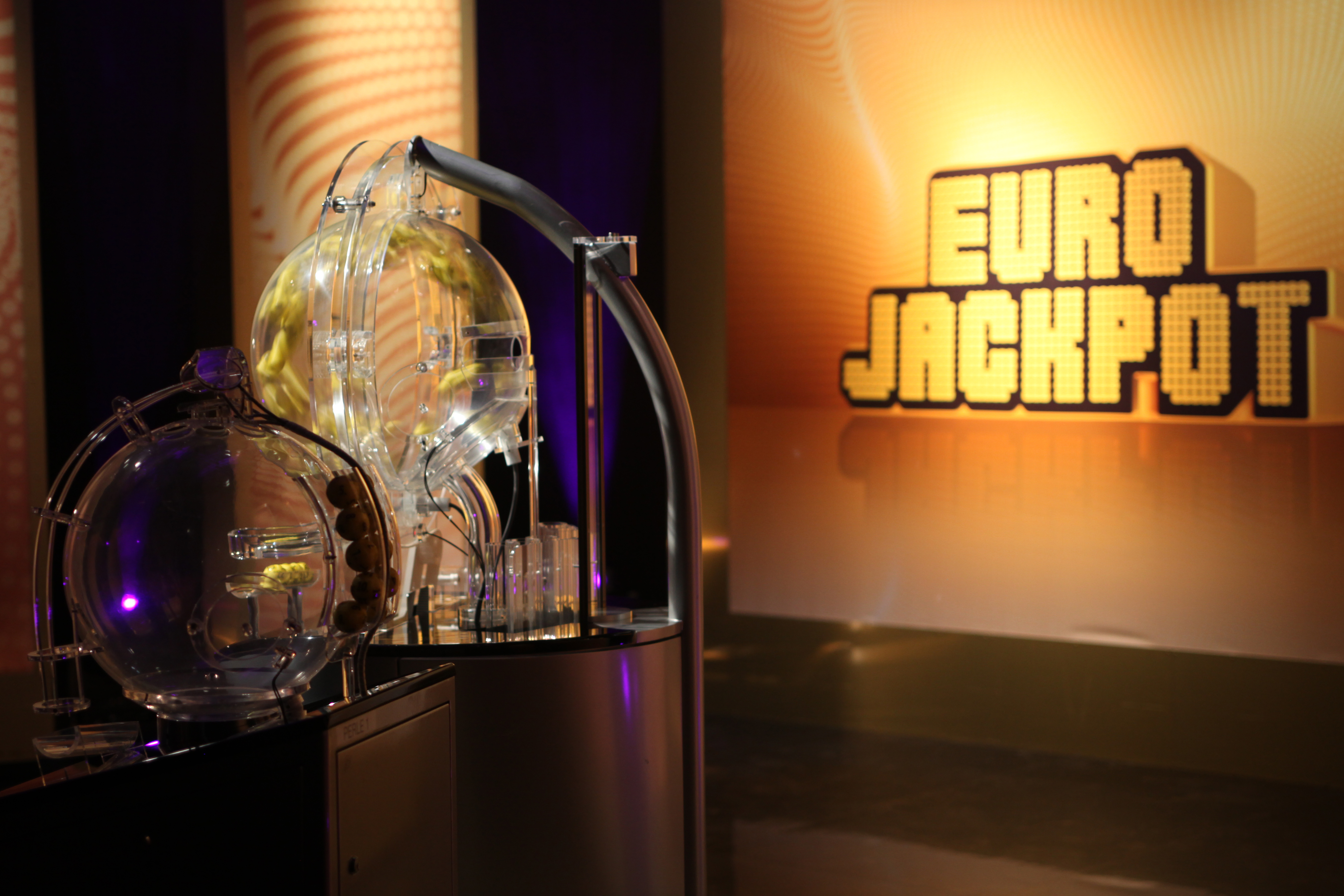 Seit 2012 besonders beliebt: der Eurojackpot. Garantierte Jackpothöhe sind 10 Mio. Euro.